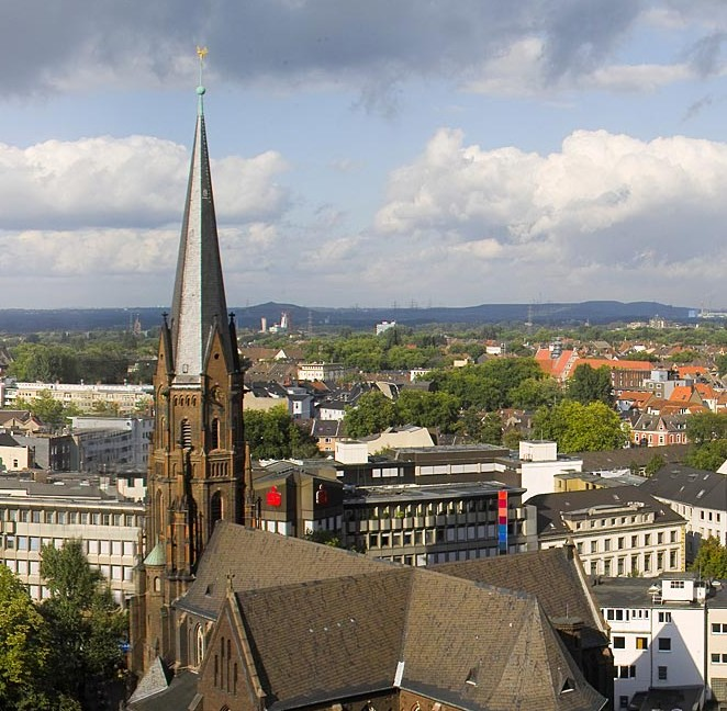 Ausschnitt aus 360°-Panorama der Altstadt von Gelsenkirchen vom Hamburg-Mannheimer-Gebäude aus fotografiert: Kath. Propsteikirche St. Augustinus